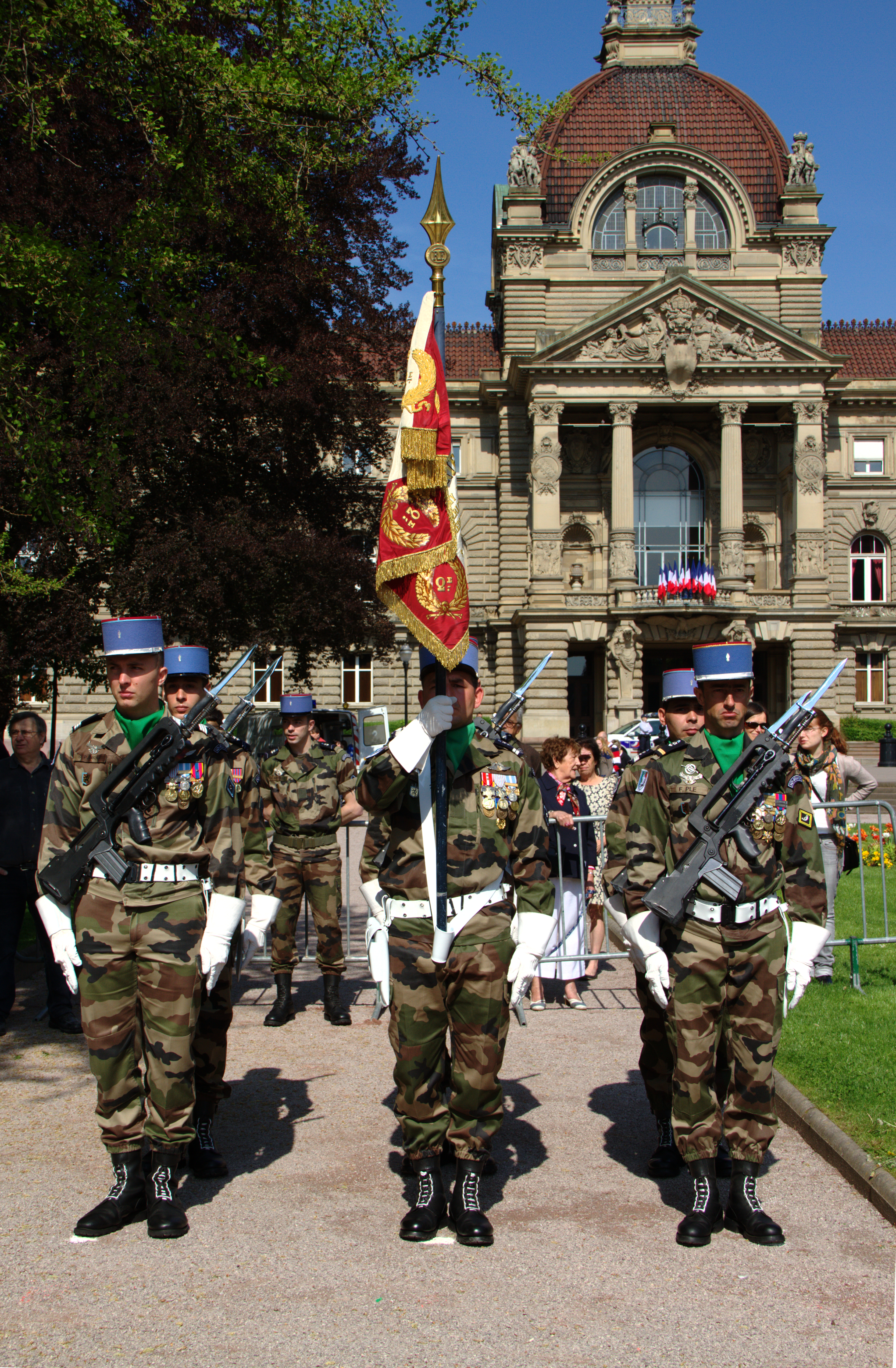 Cérémonie commémorative du 8-mai-1945 Strasbourg, place de la République 8 mai 2013